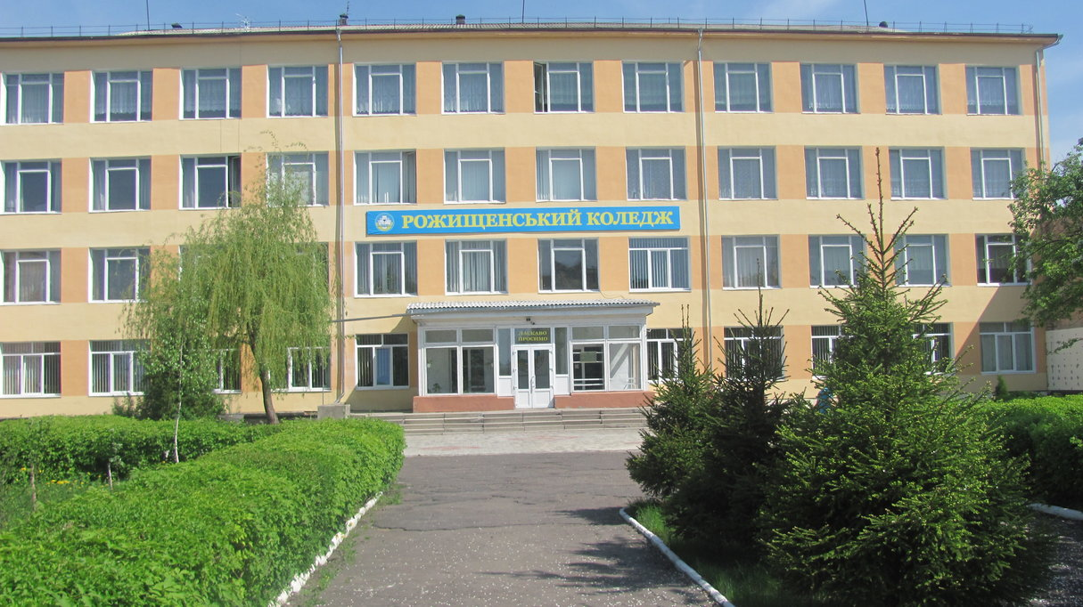 Будівля коледжу